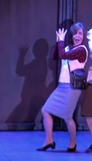 ‘Polònia. El musical' a l’Atrium Viladecans, 13 de maig 2015. Mireia Portas imitant Carme Forcadell com part del "grup" de "les Catalines".